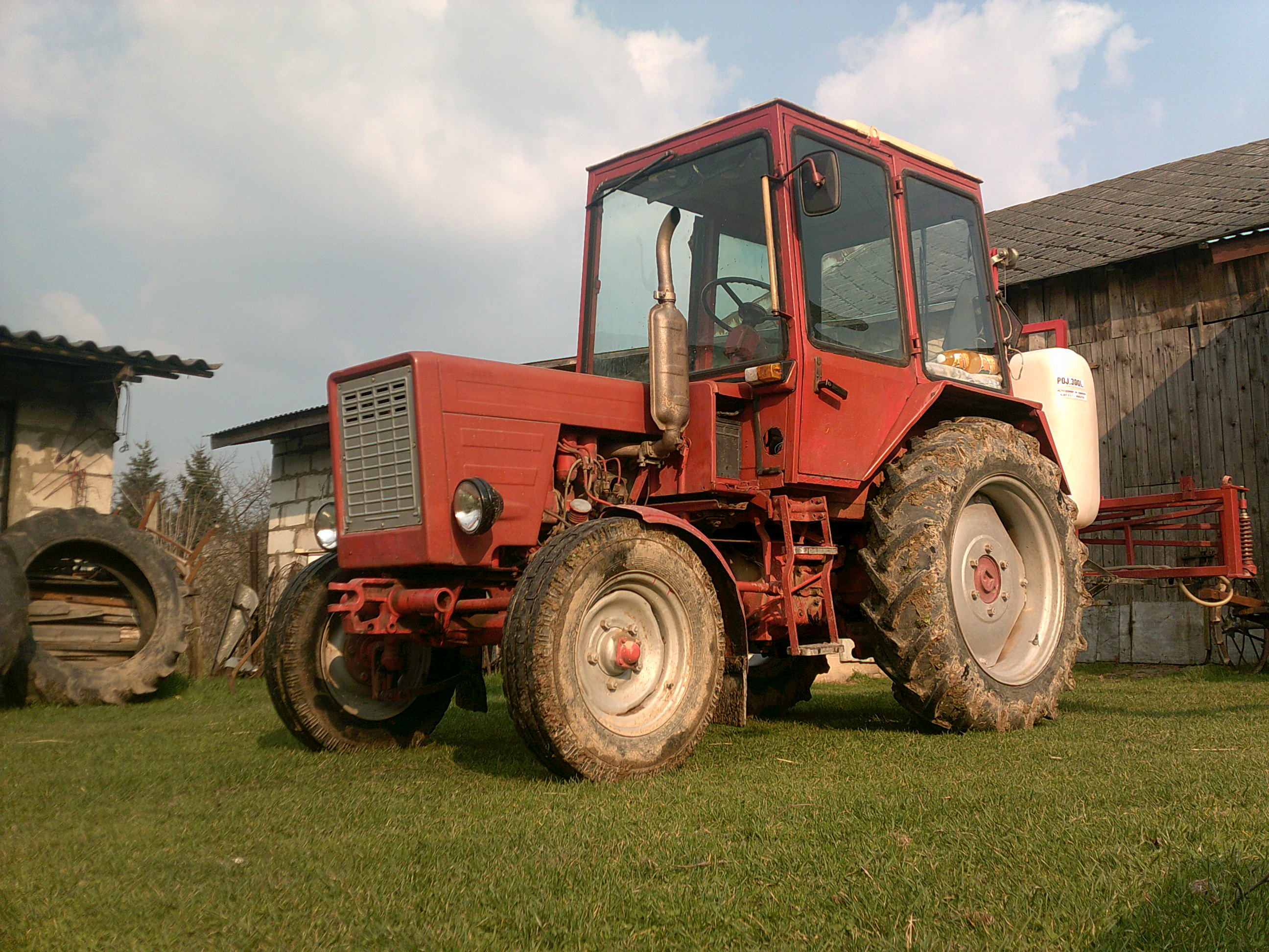 Ten egzemparz ciągnika Władymirec T-25 A2 został wyprodukowany w ZSRR w 1989 roku.